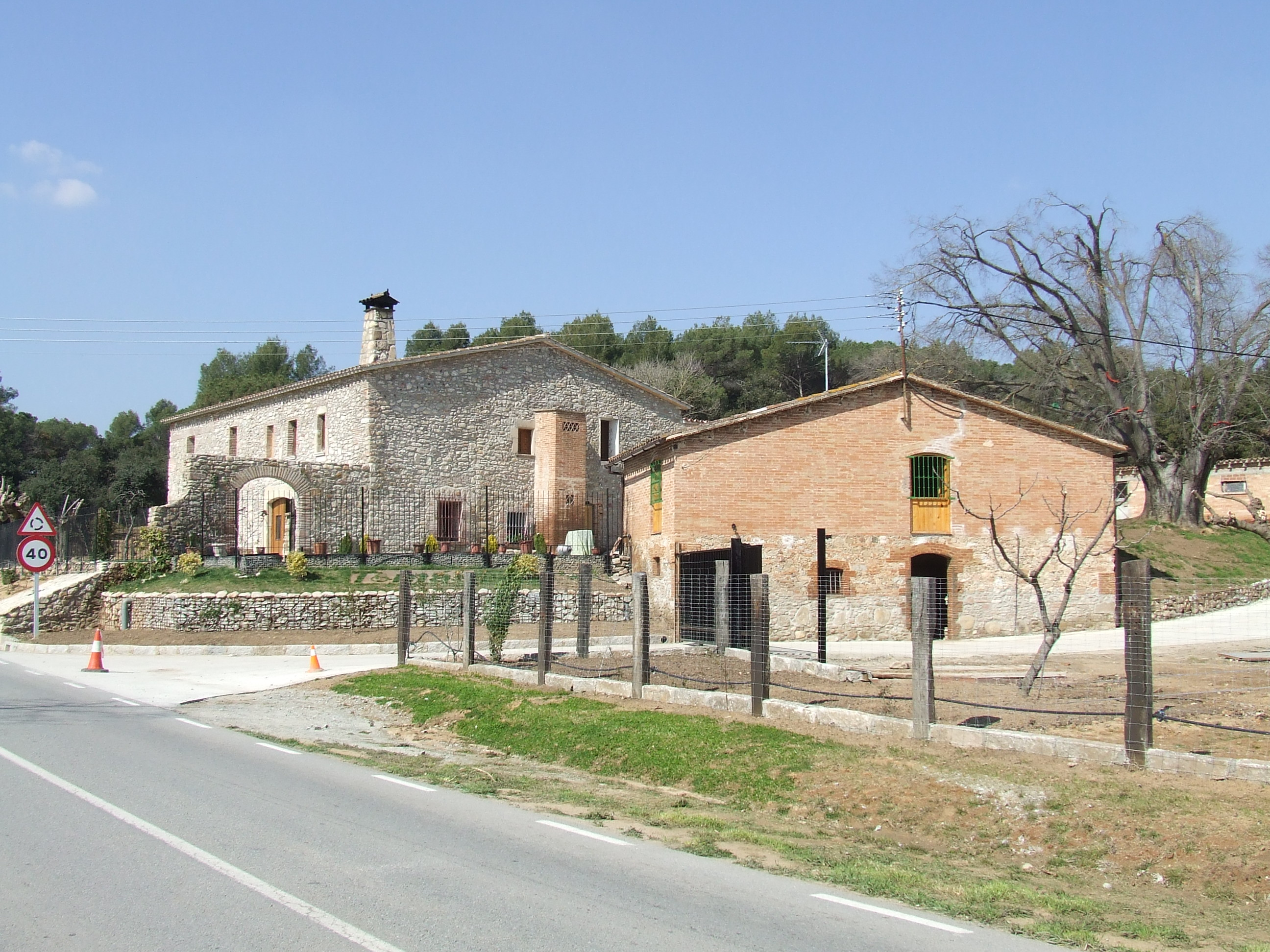 Can Ribafort (Bigues, Bigues i Riells, Vallès Oriental)